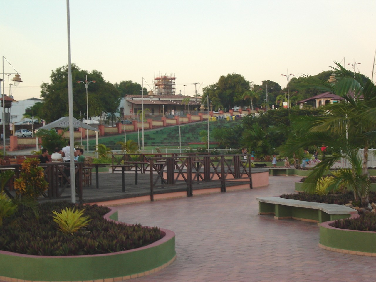 Orla Taumanan sobre o Rio Branco, ponto turístico de Boa Vista, Roraima.